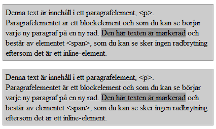 Bild för att illustrera skillnaden mellan block- och inline-element i HTML.